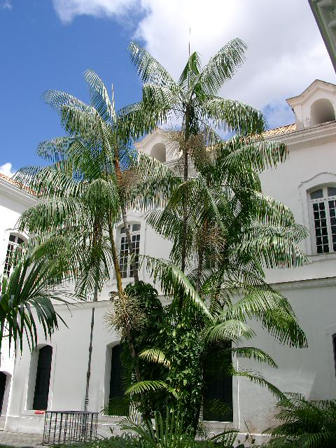 Açaí-Palme (Euterpe oleracea) im Garten des Palácio Lauro Sodré in Belem (Brasilien)